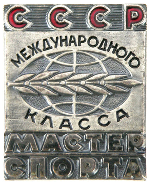 Знак к званию "Мастер спорта СССР международного класса".